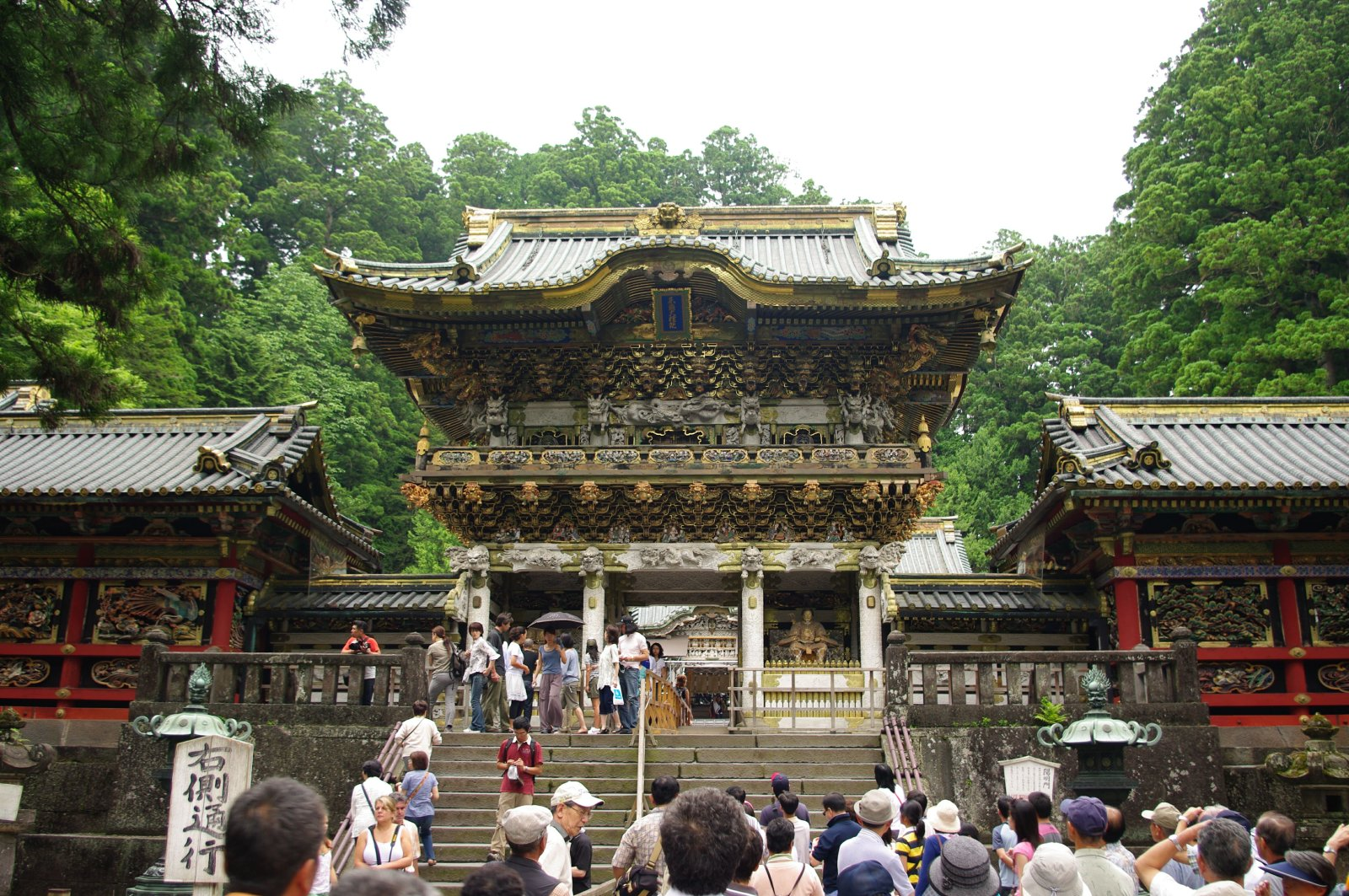 Yomeimon-Gebäude Toshogu-Schrein